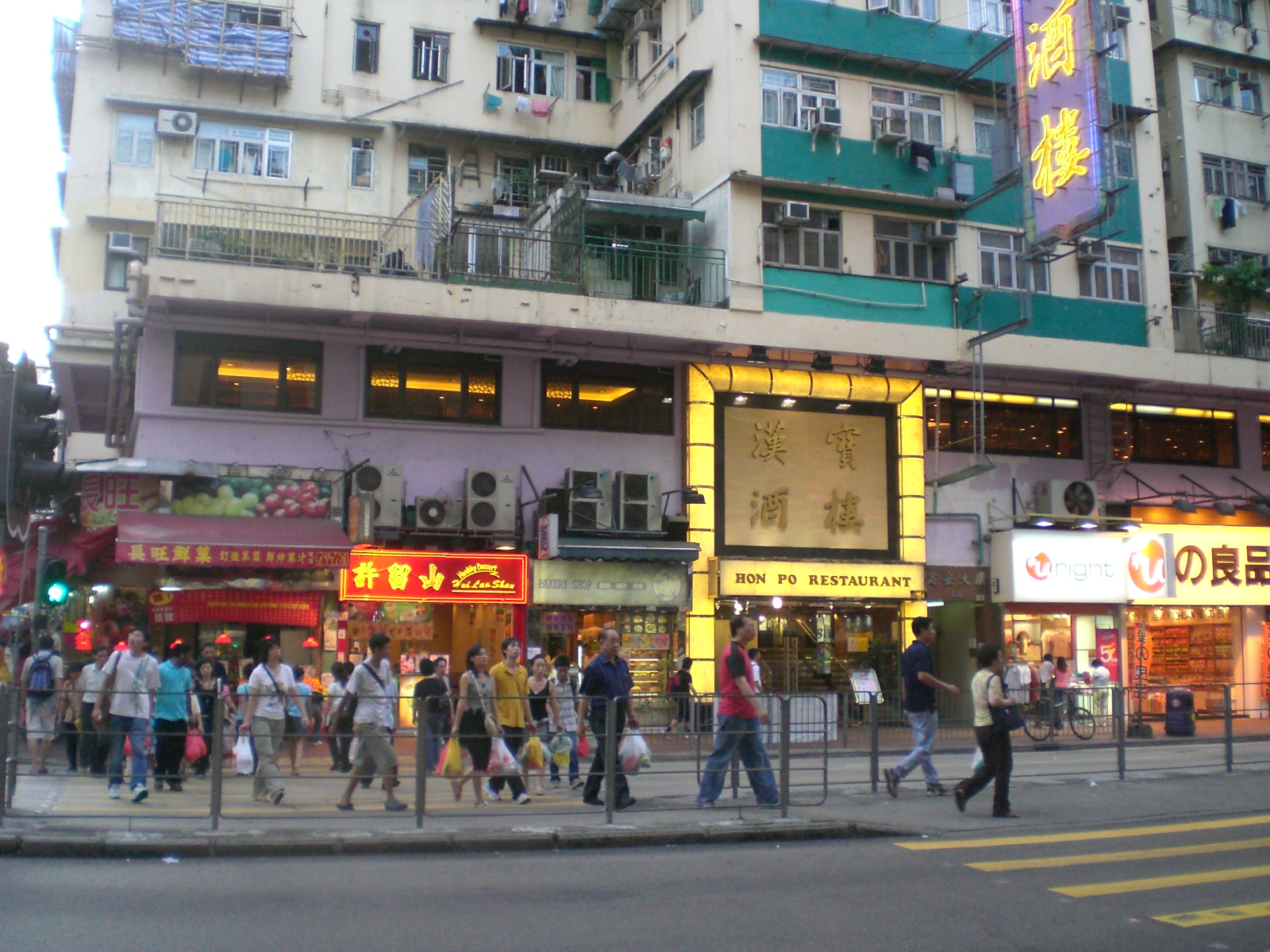 土瓜灣漢寶酒樓, 土瓜灣道, 落山道街市.